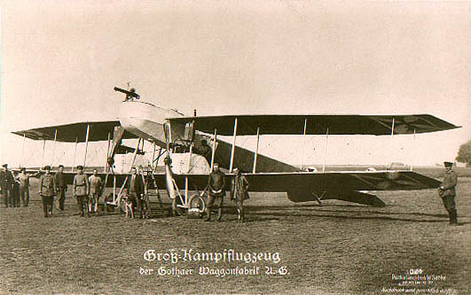 Gotha-Ursinus GUH G.I - Groß - Kampfflugzeug der Gothaer Waggonfabrik A. G., Sanke Postkarte Nr. 1021